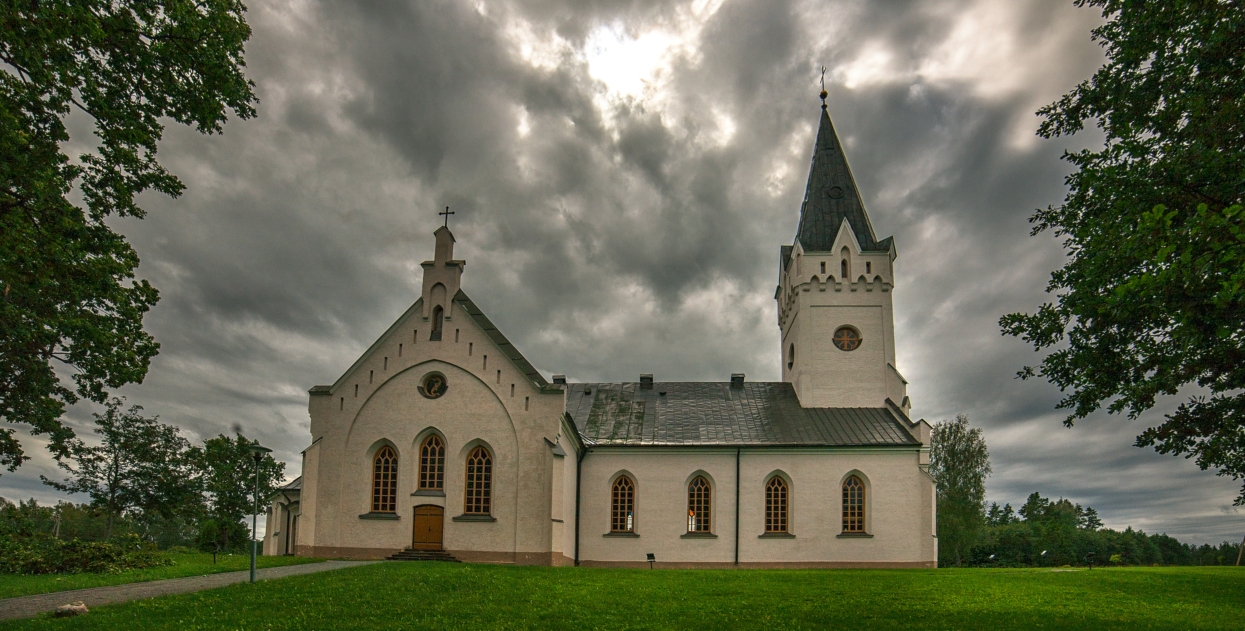 Jaunpiebalgas luterāņu baznīca, Jaunpiebalga, Gaujas iela 23